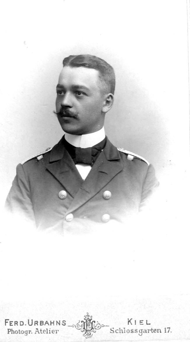 Portraitfoto aus Familienbesitz